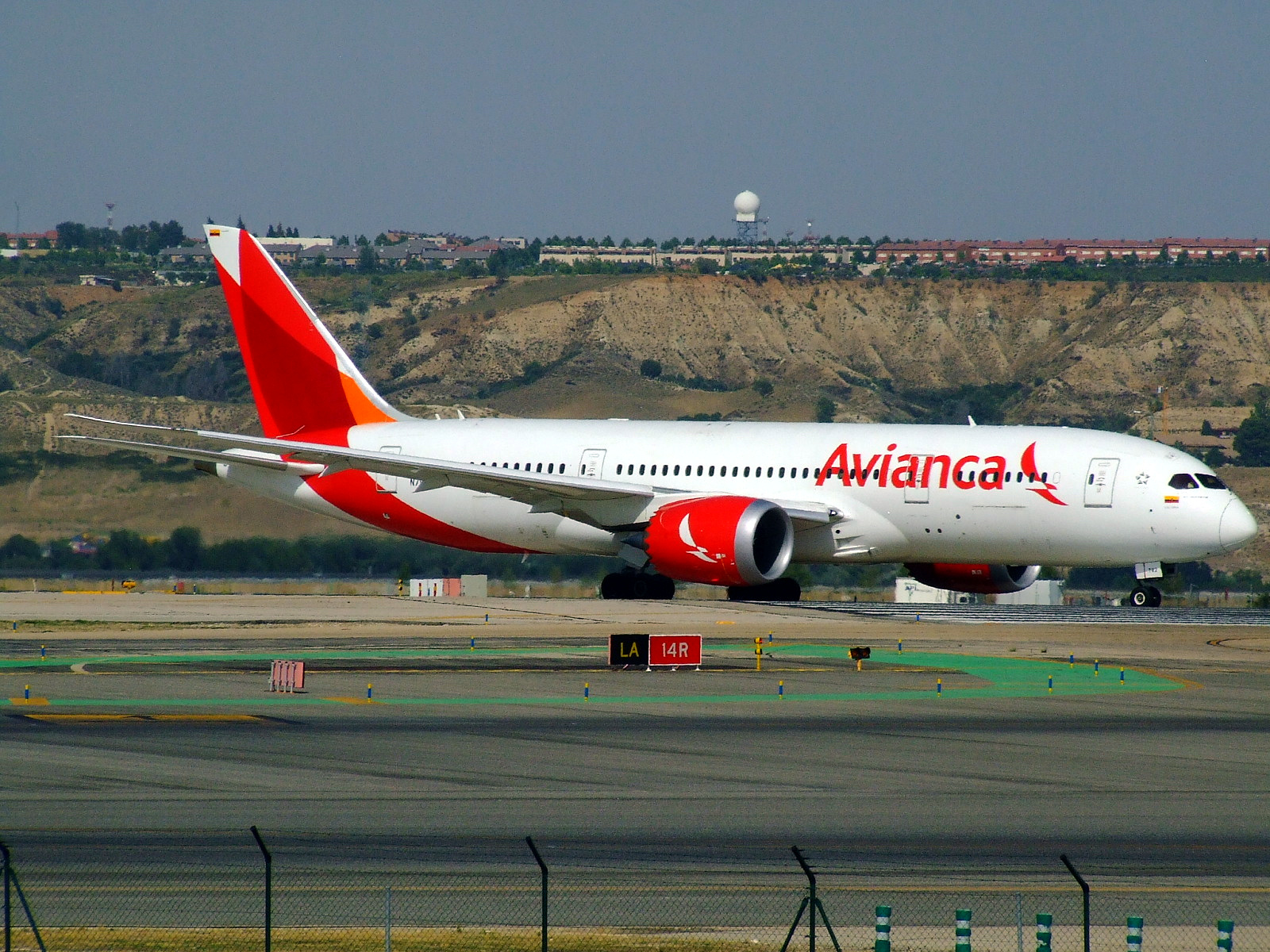 Boeing 787-8 Dreamlimer (N782AV) de Avianca maniobrando para despegar del aeropuerto Adolfo Suárez Madrid-Barajas (MAD/LEMD).